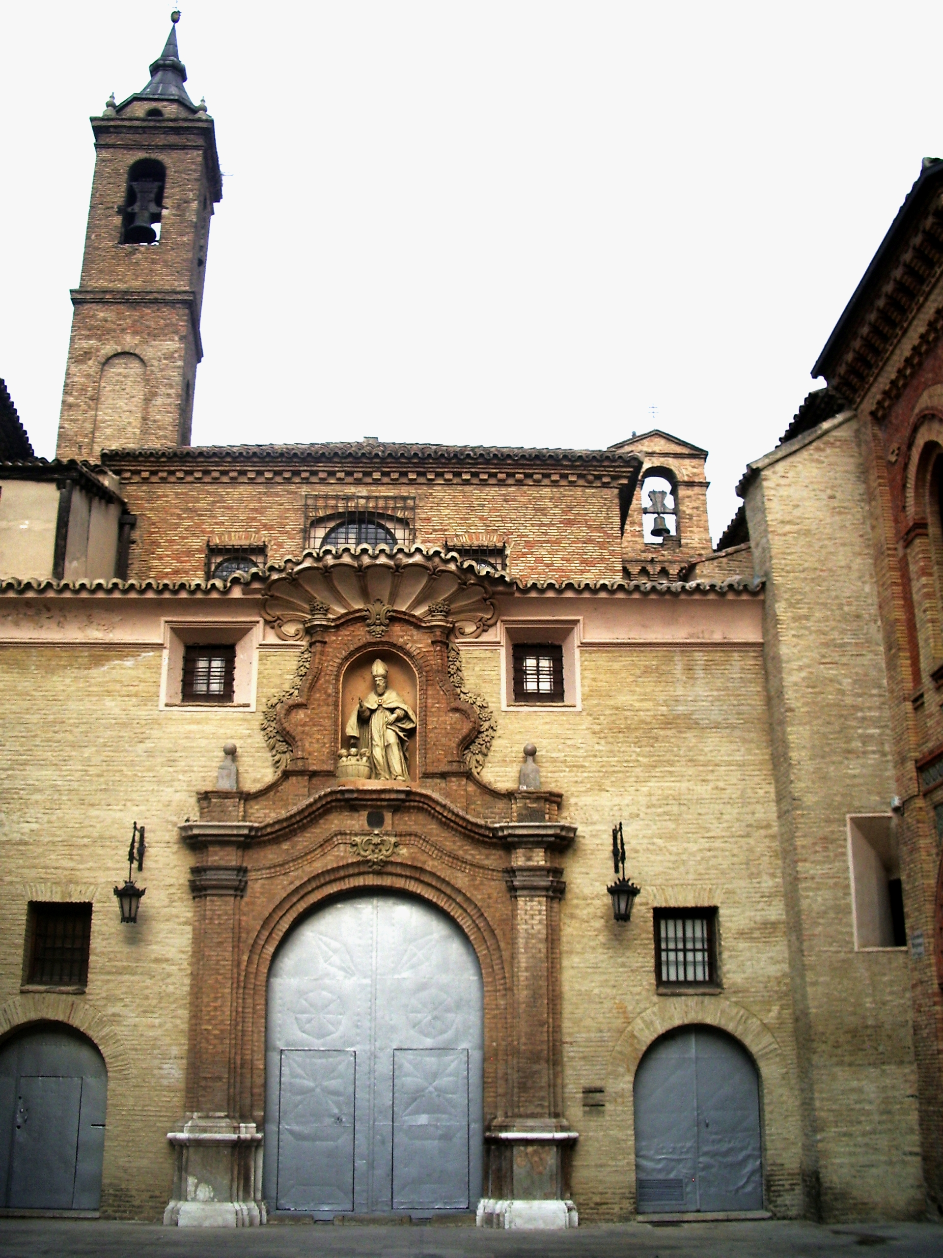 Iglesia de San Nicolás de Bari (Zaragoza)